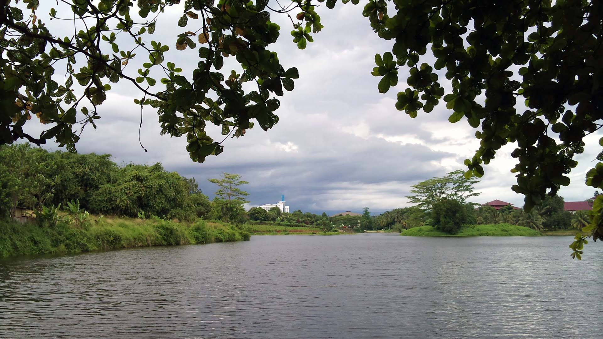 Setu Cibinong, Cibinong, Bogor, Jawa Barat